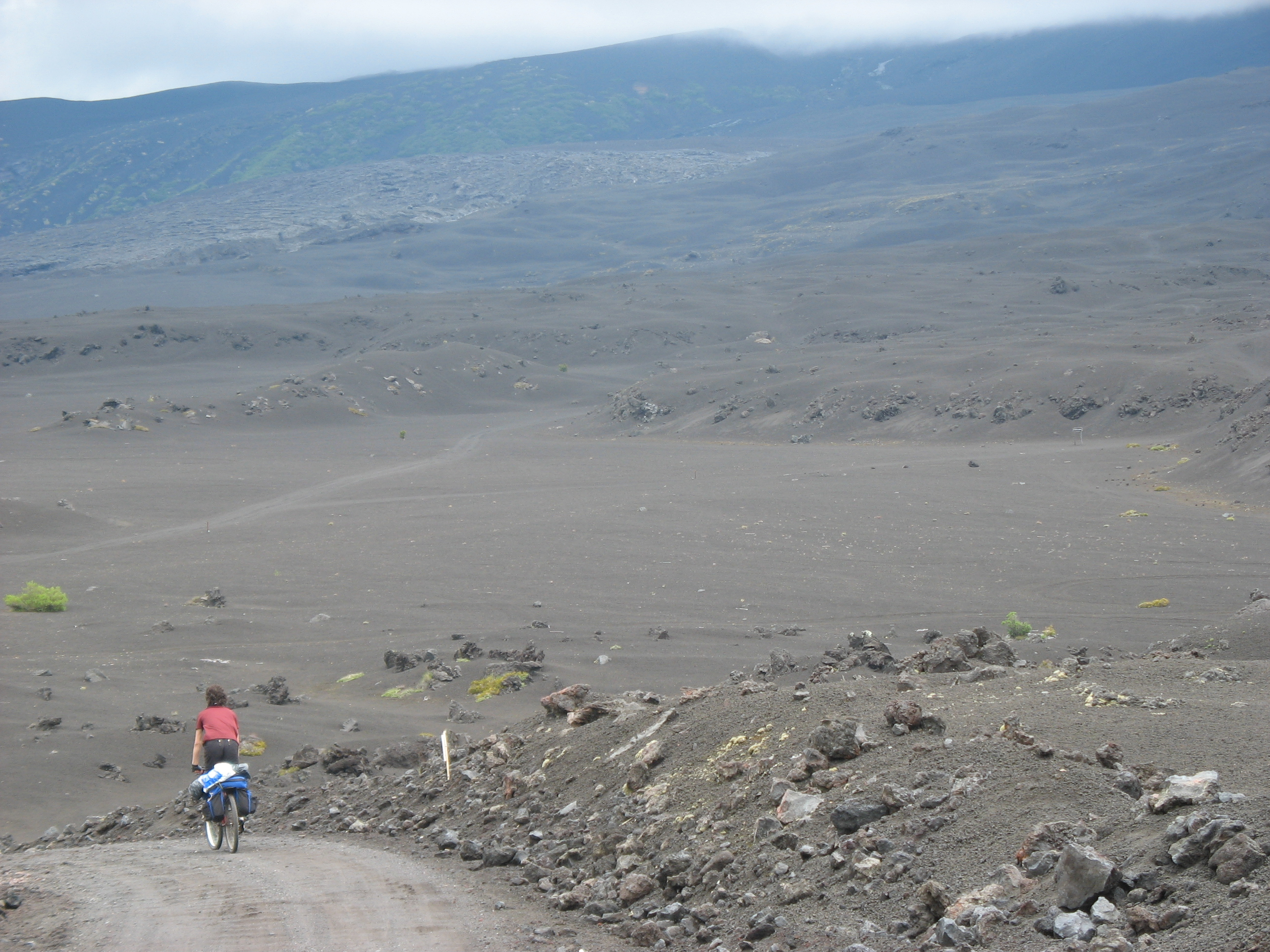 Cenizas en las laderas del volcán Llaima